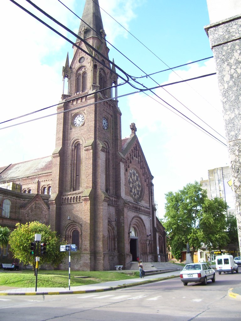 La Iglesia Nuestra Señora de la Merced, Pergamino, Argentina.